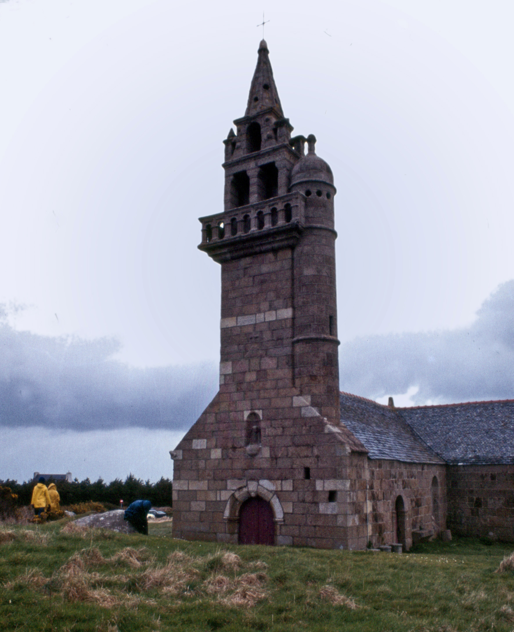 Carantec, Callot 1978